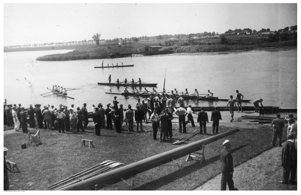 Przystań Klubu Wioślarskiego Gopło. Na wodzie osady wioślarskie. Na brzegu stoi publiczność, widać porozkładany sprzęt wioślarski. Zawody Wioślarskie w Kruszwicy 08.1938 rok